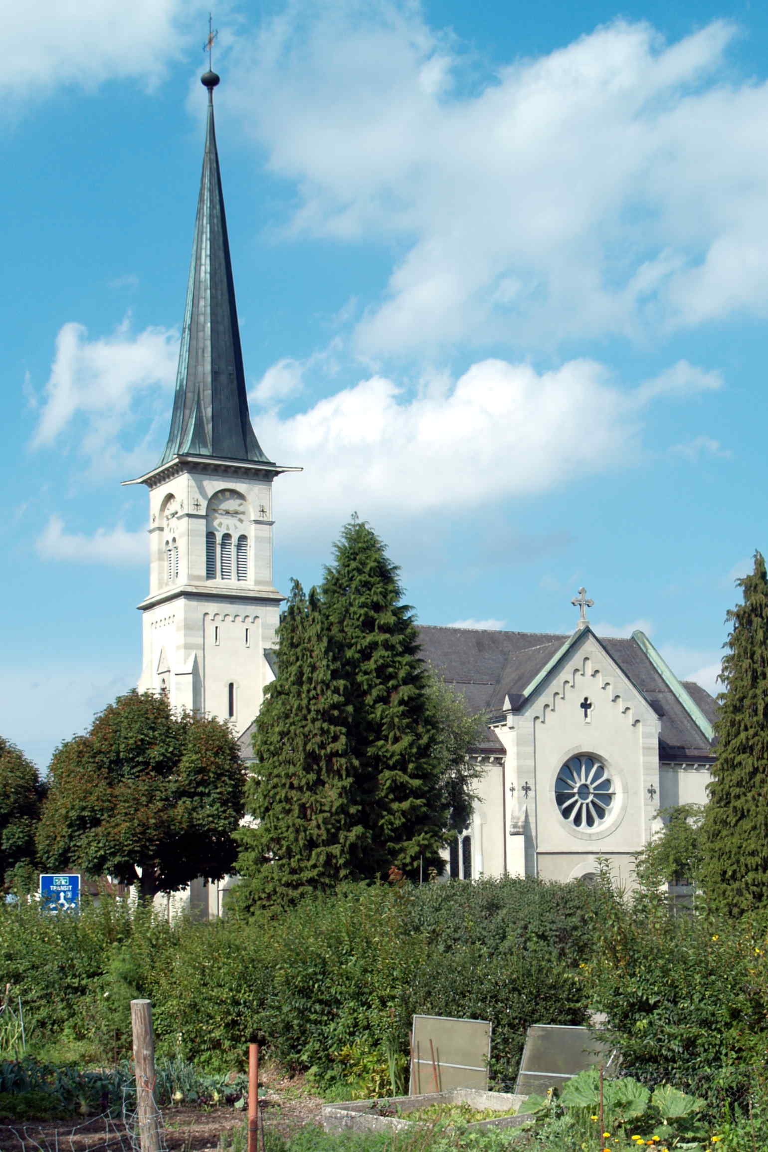 Katholische Kirche von Neuenhof in der Schweiz